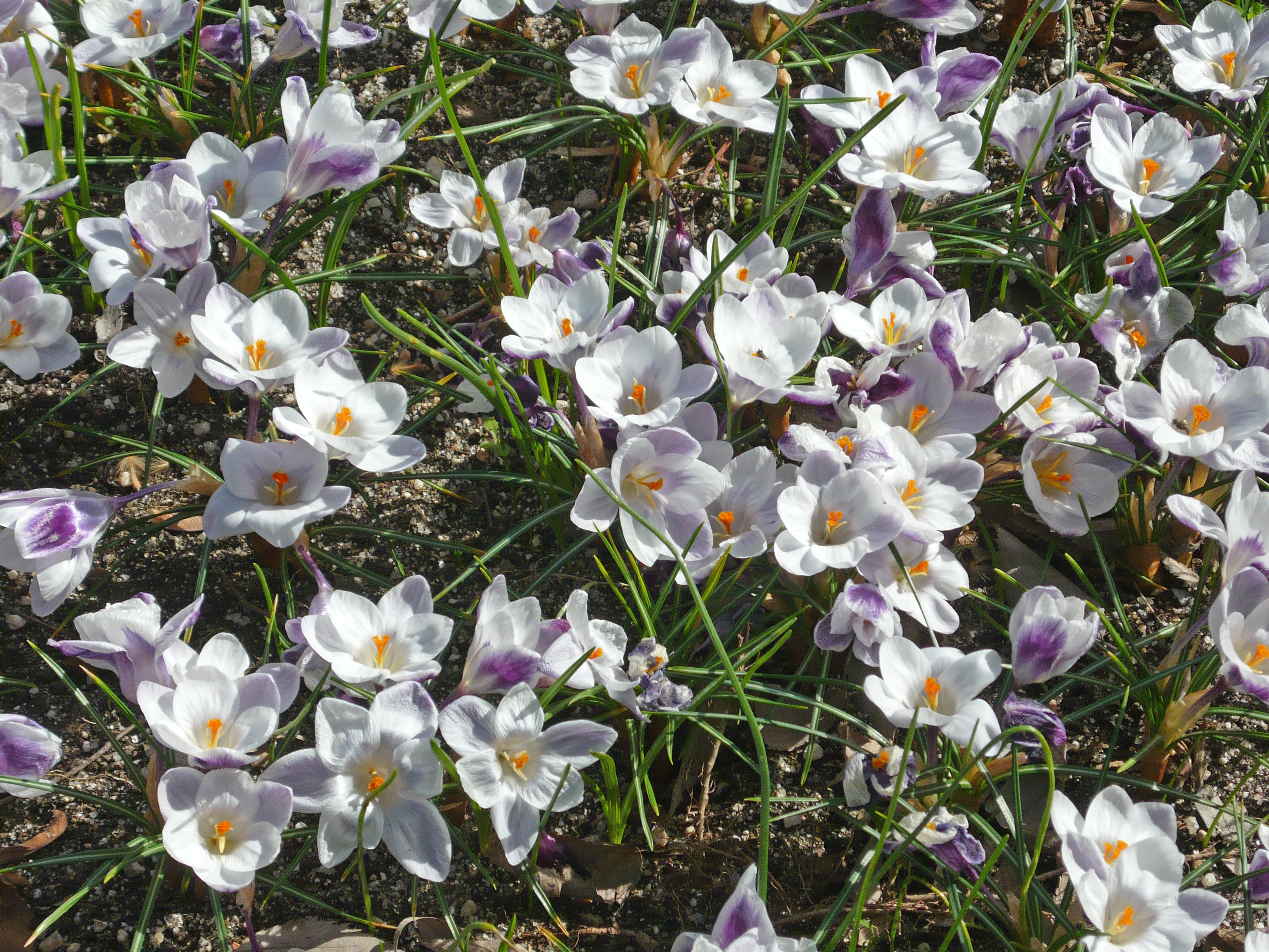 Crocus chrysanthus 'Prins Claus'. Real Jardín Botánico de Madrid.